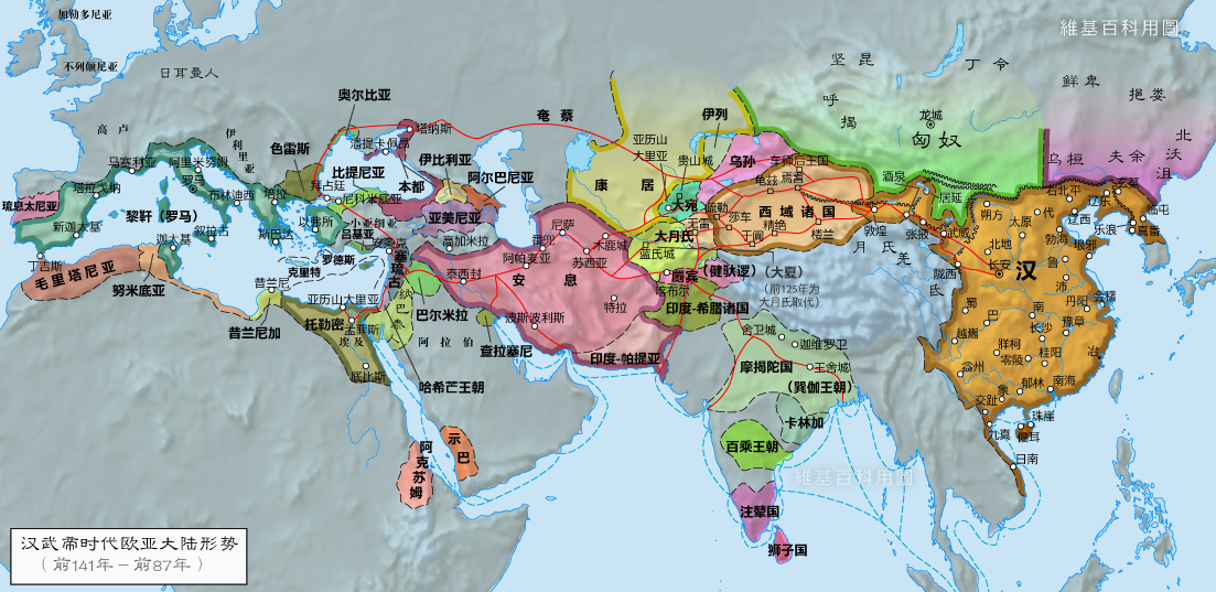 汉武帝时代欧亚大陆形势